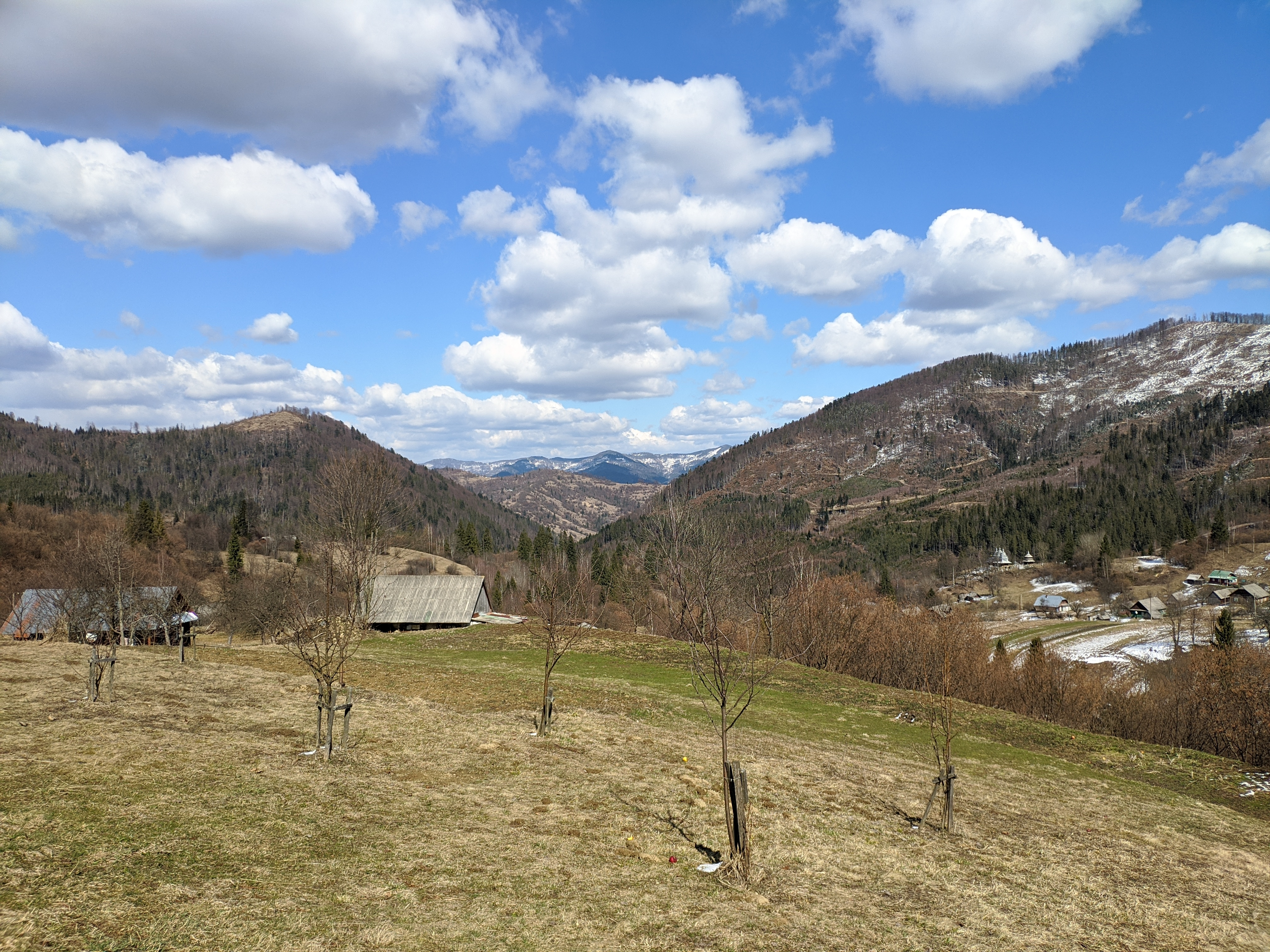 Вигляд на Маківку та Кливу з Грабівця